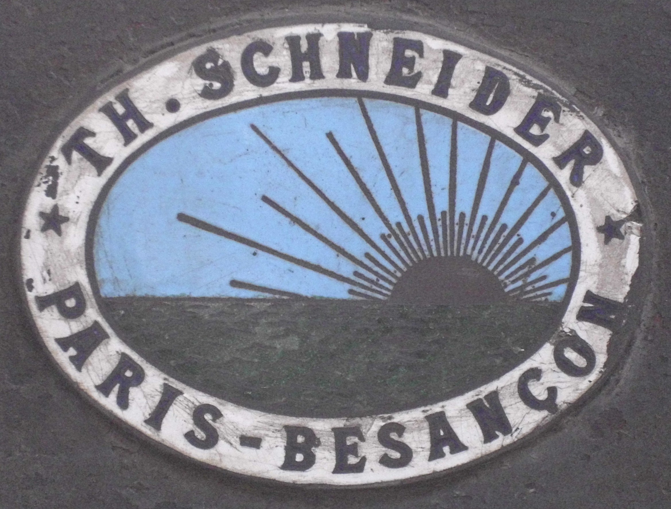 Emblem Th. Schneider